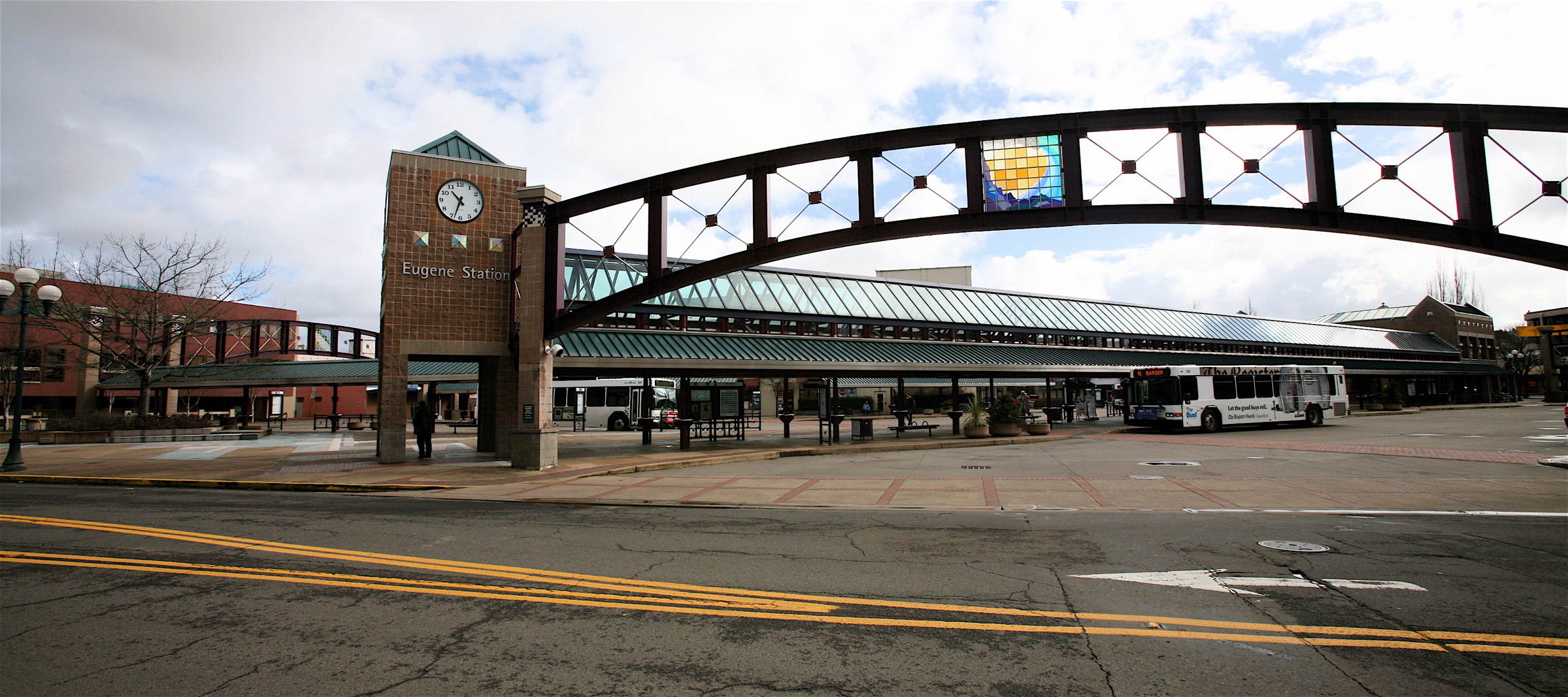 Eugene Station transit mall in Eugene, Oregon.